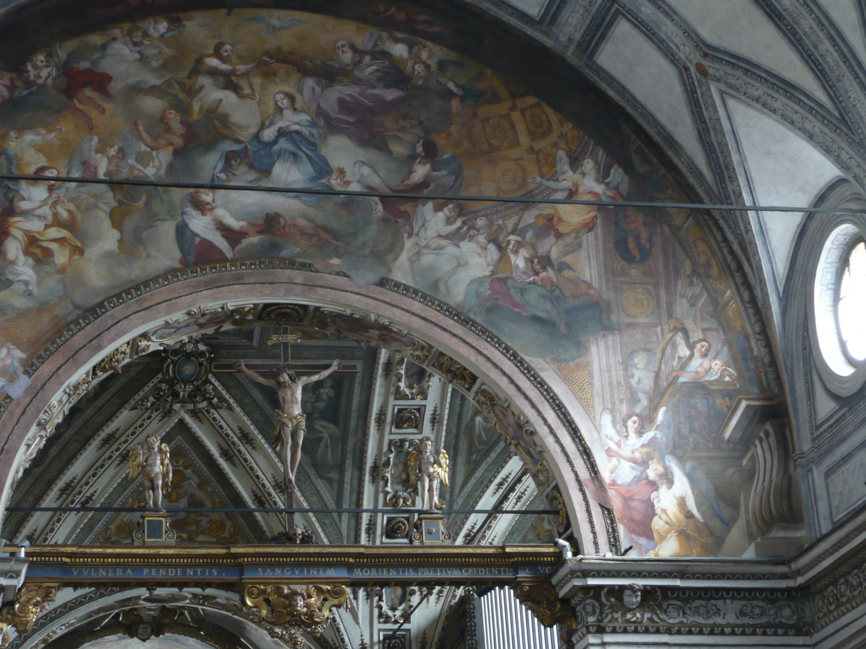 Legnanino, Assunzione